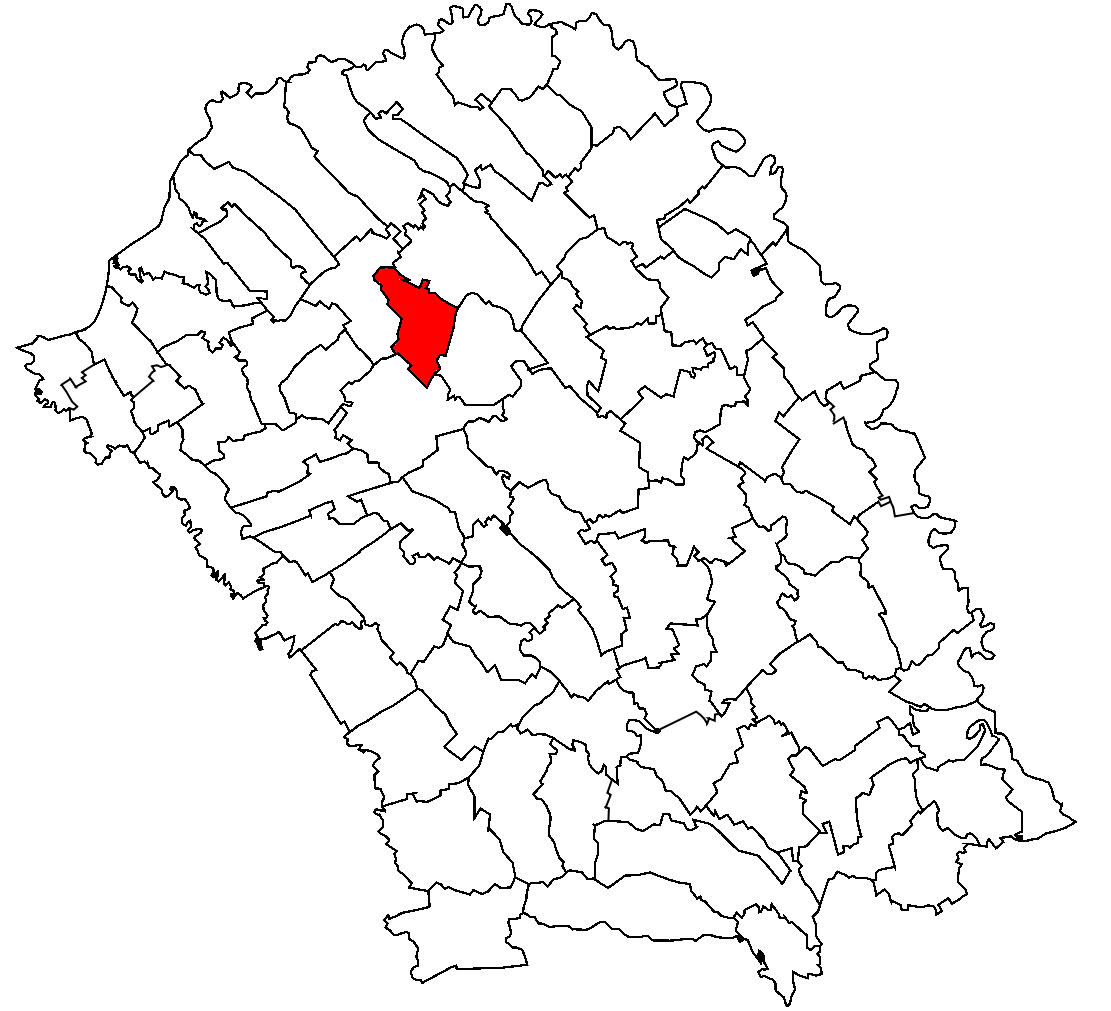 Categorie:Hărţi ale judeţului Botoşani